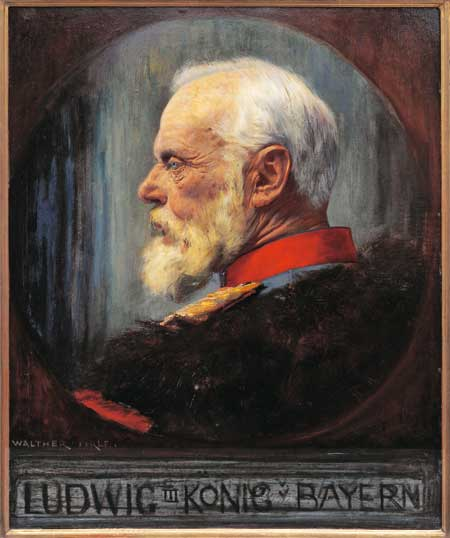 Ludwig III., König von Bayern (Entwurf für eine Briefmarke), Öl auf Malpappe; 58 x 48,5 cm